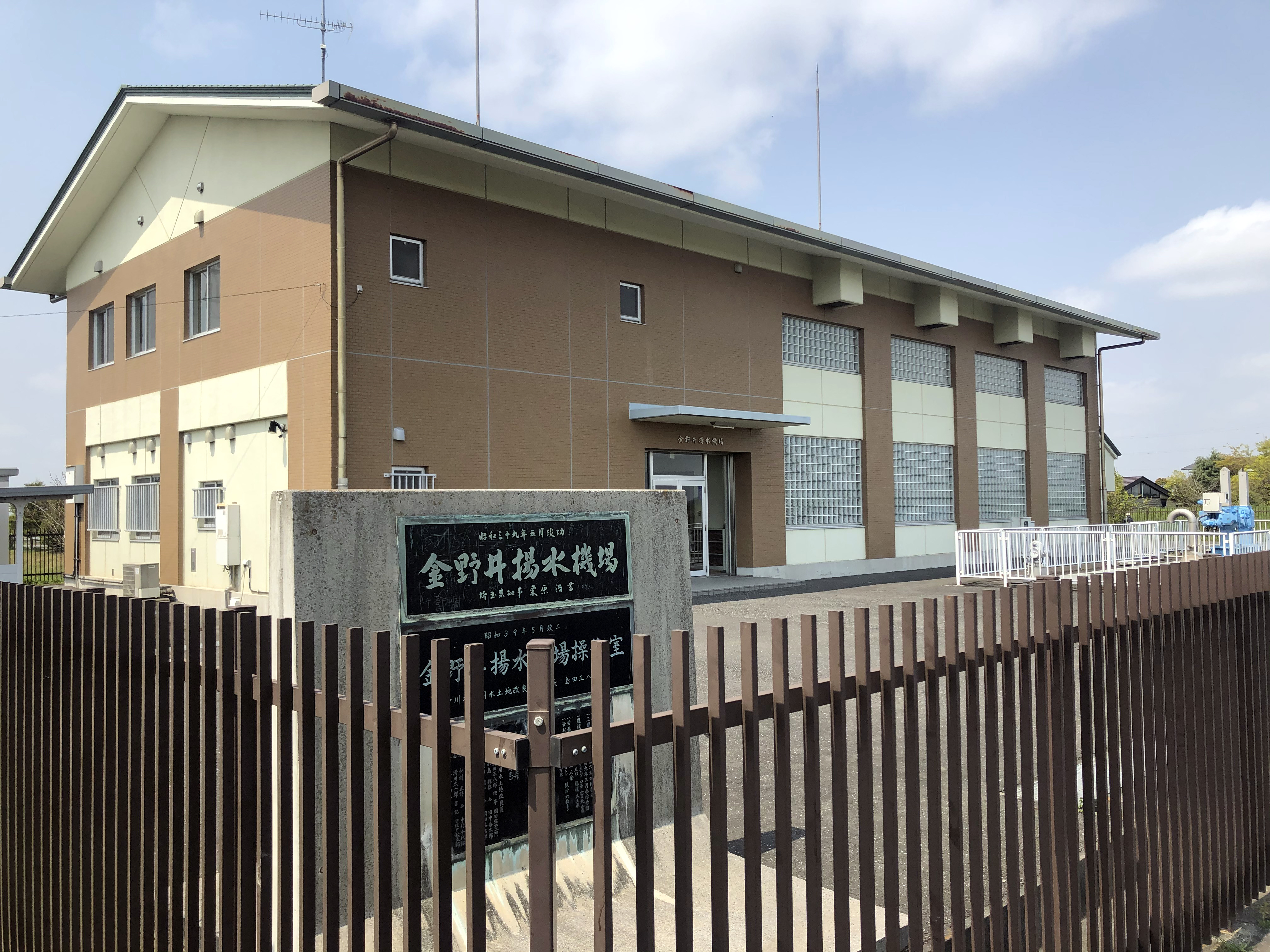 春日部市 金野井揚水機場（金野井用水路）